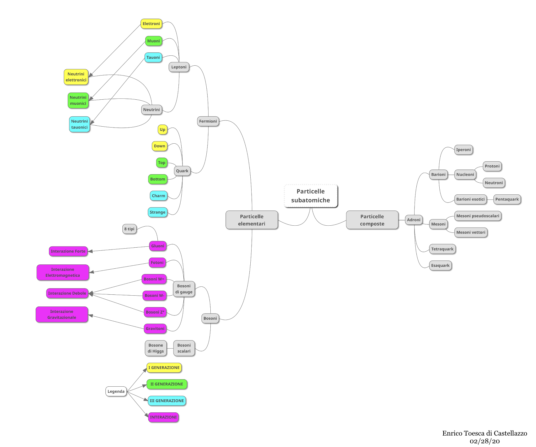 Schema illustrativo delle particelle subatomiche contenente tutte le particelle elementari e quelle composte ad eccezione delle tipologie di mesoni e barioni